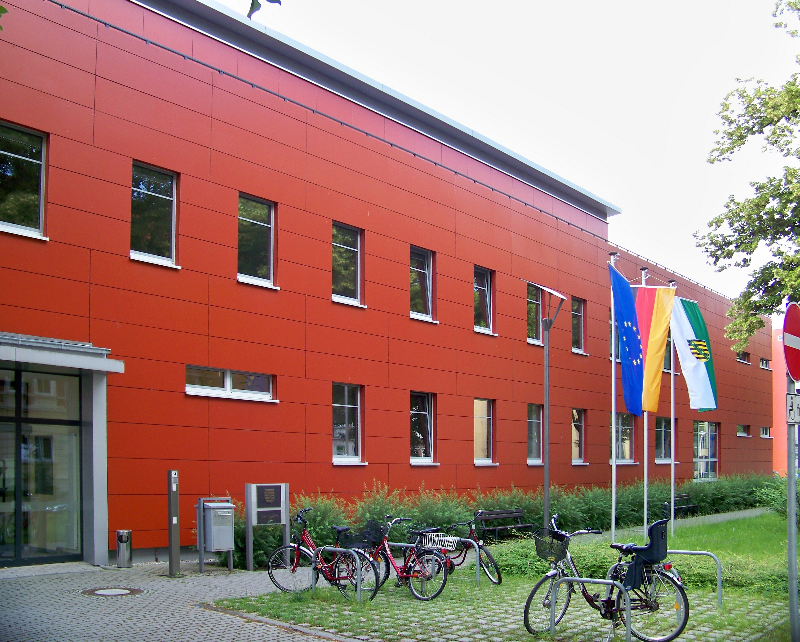 Anbau an das Amtsgericht in Eilenburg, u.a. zur Unterbringung einer Kantine für das benachbarte Verwaltungszentrum